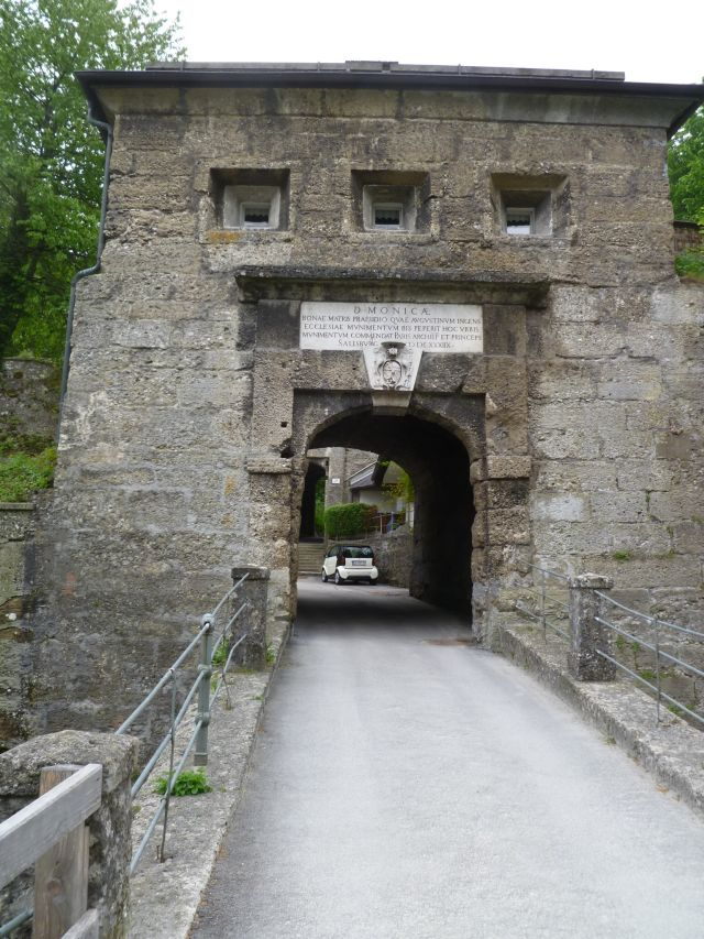 Monikapforte (Mönchsberg)